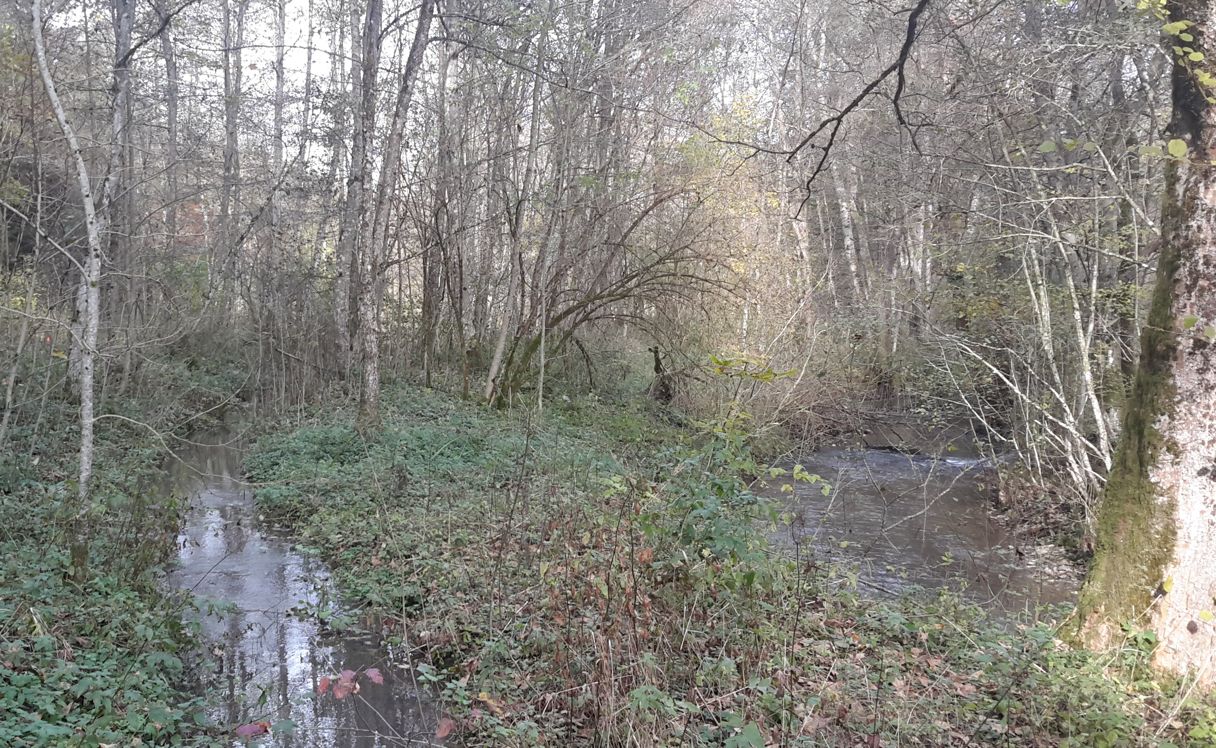 Heimbachaue